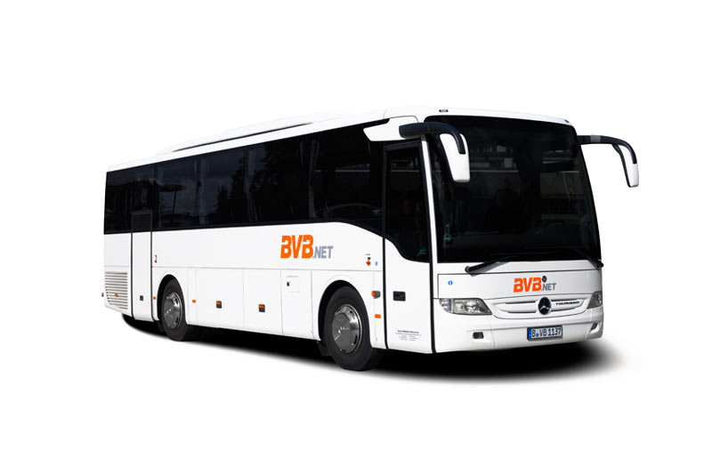 MB Tourismo K - Beispiel für einen BVB Bus mit 16-30 Sitzplätzen